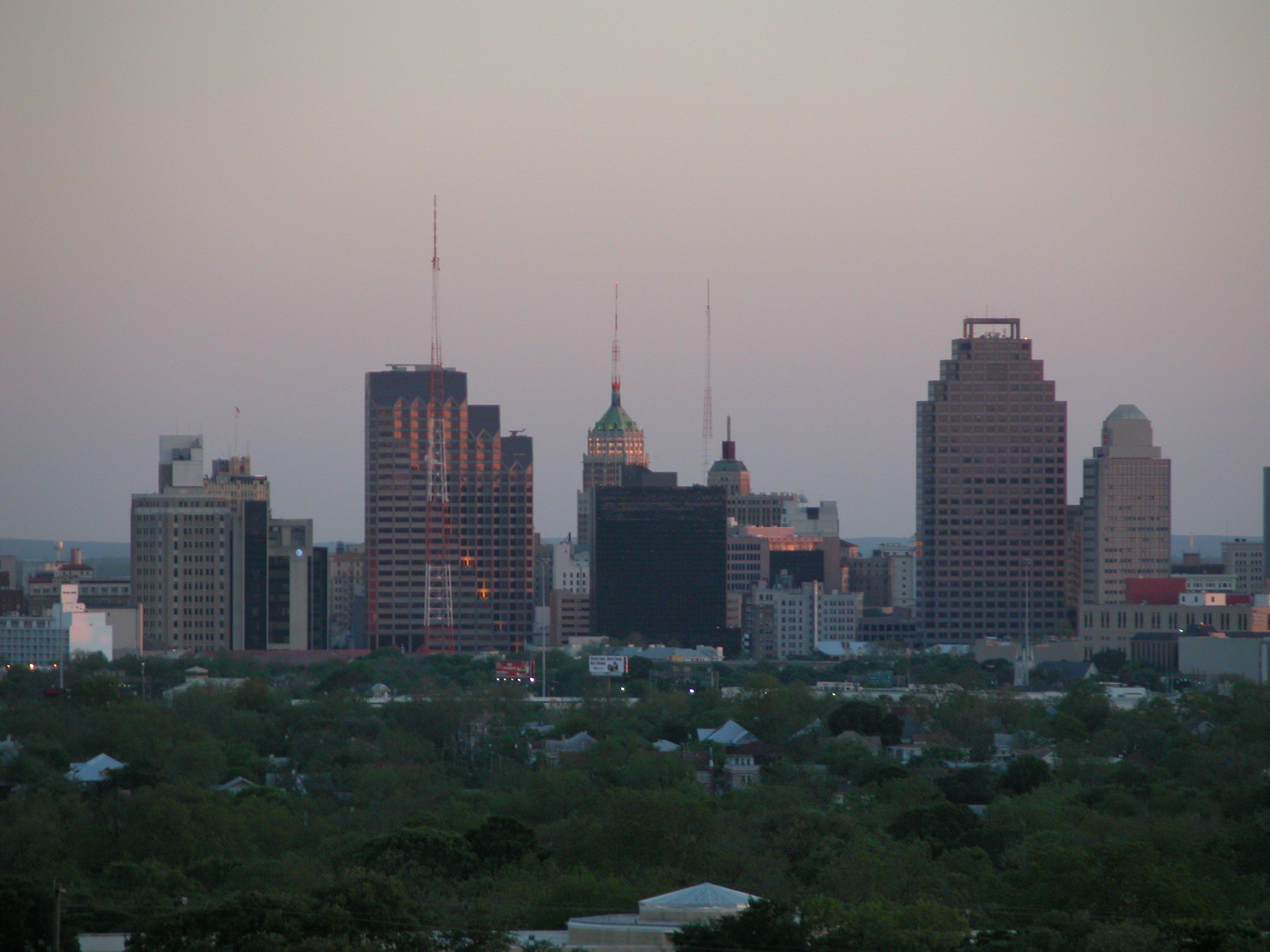 dirk-annie_286.JPG